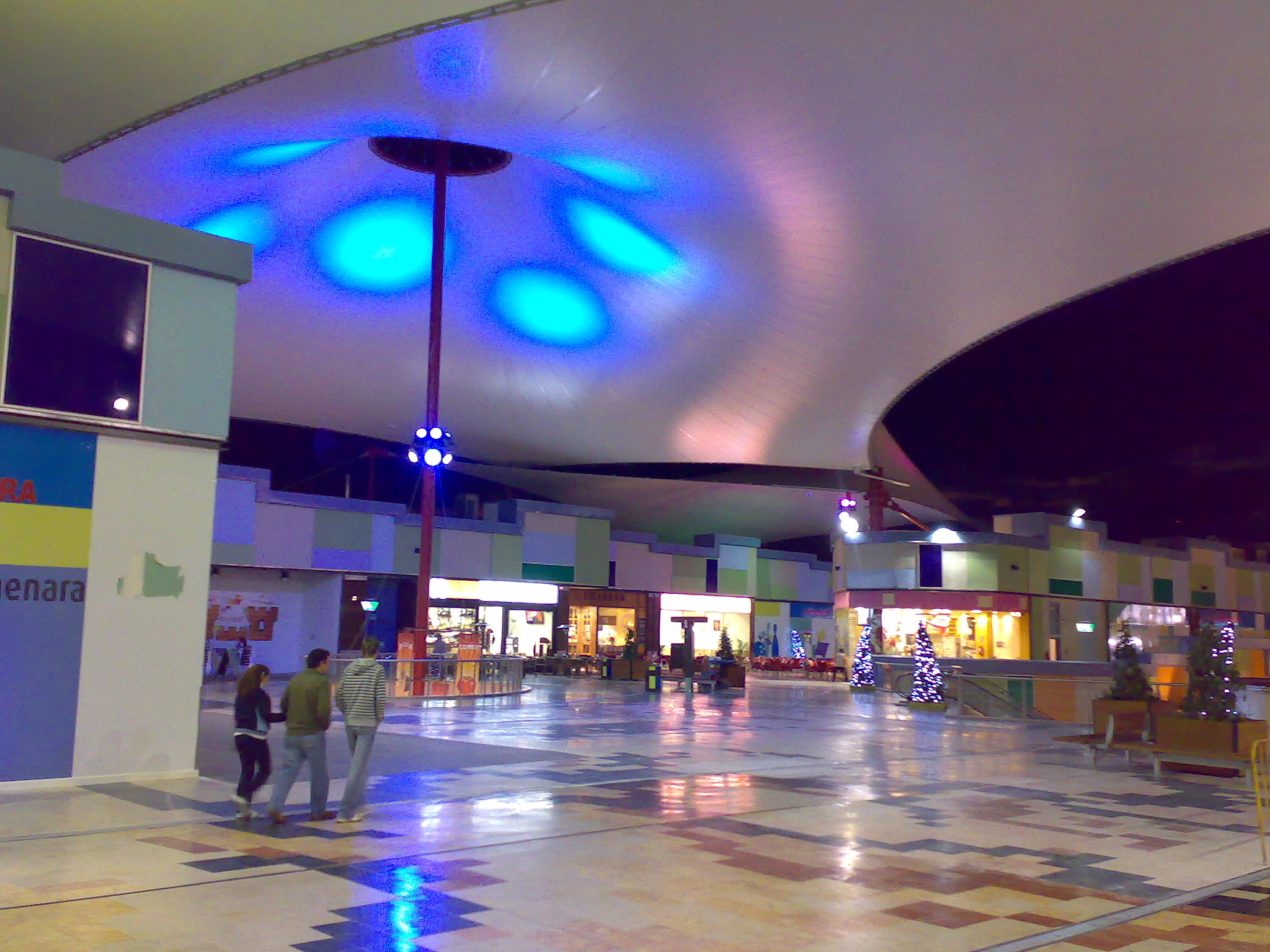 Foto por la noche de la carpa principal del Parque Almenara.